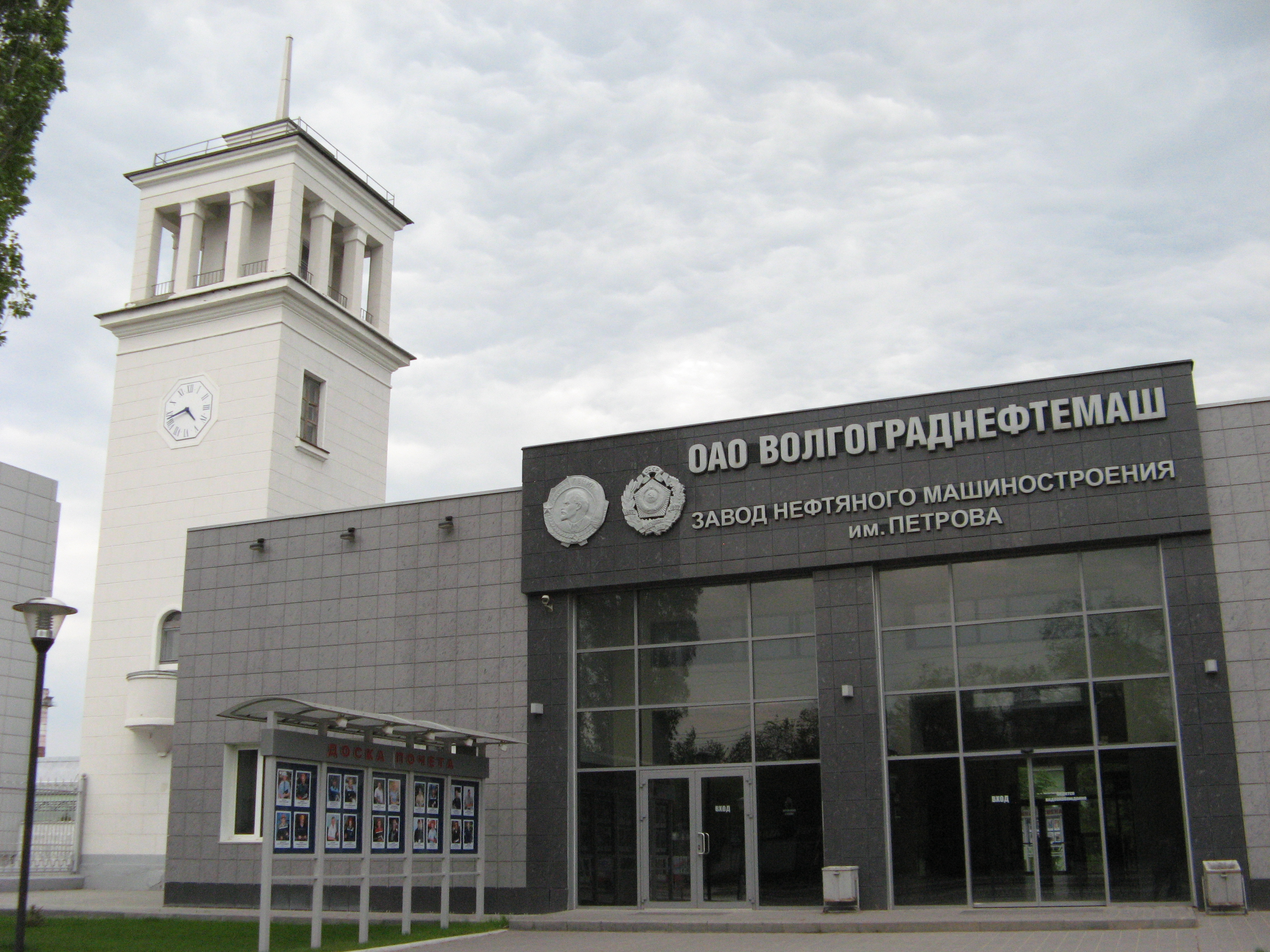 Завод «Волгограднефтемаш» в Волгограде